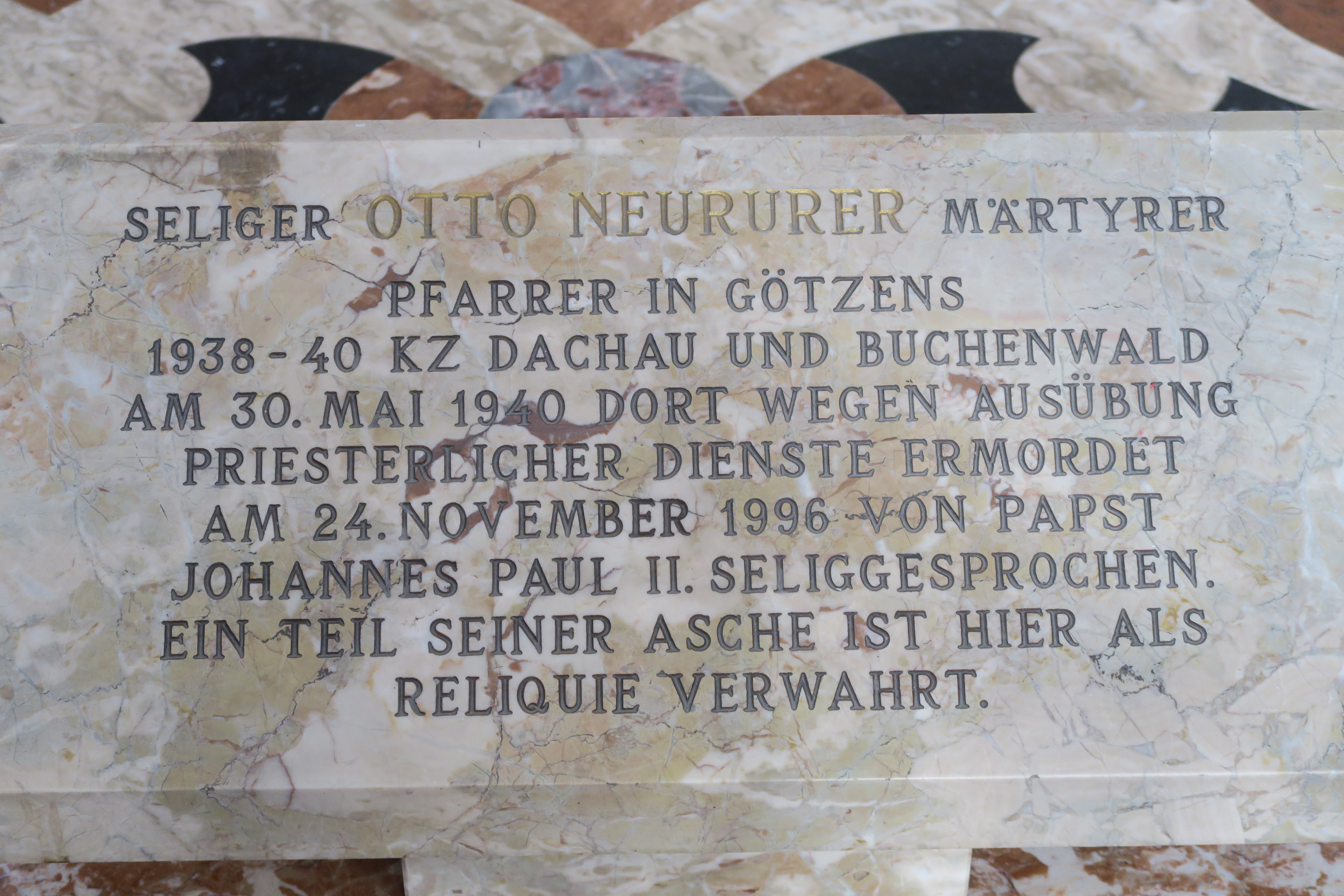 Die Gedenktafel an den selig gesprochenen Märtyerer schildert dessen Leben und Seligsprechung